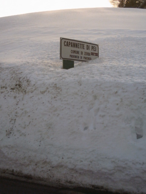 Capannette di Pey di Zerba (PC) in Val Boreca